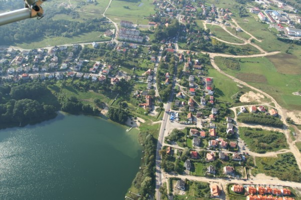 opis grafiki